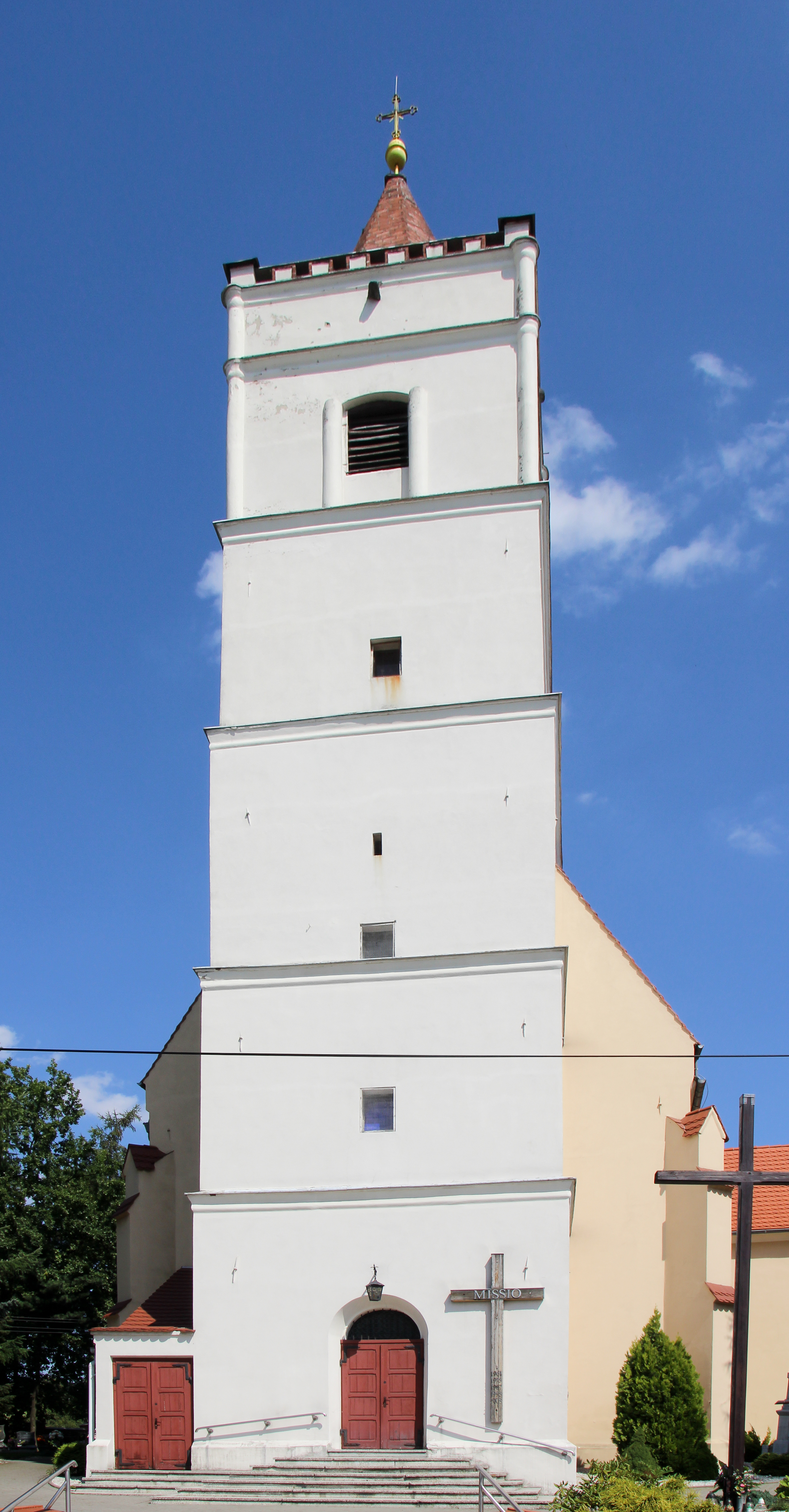 Niemysłowice – rzymskokatolicki kościół parafialny p.w. św. Anny, 1568, XIX.